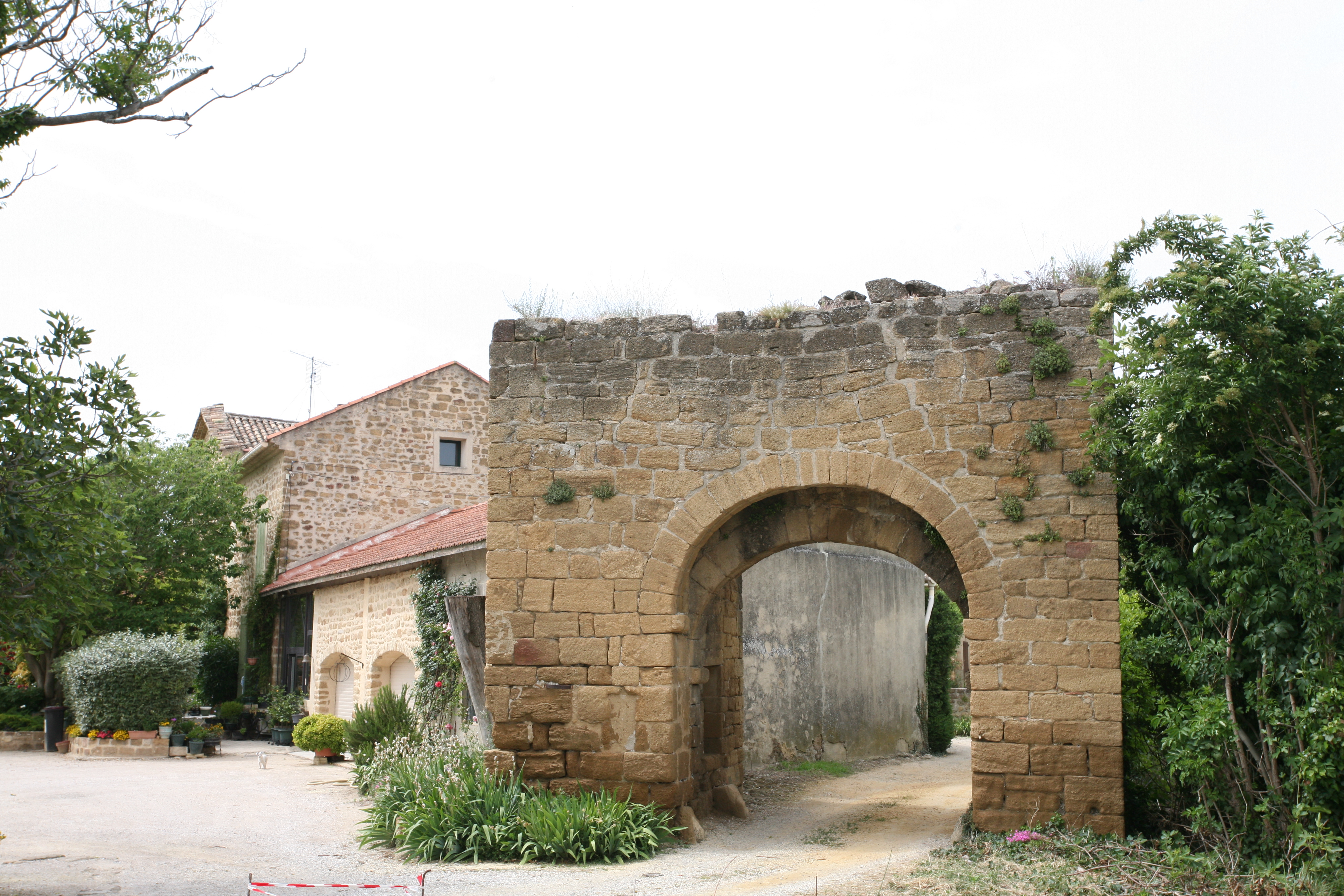 Entrée de l'ancien Travaillan (commune de Vaucluse)